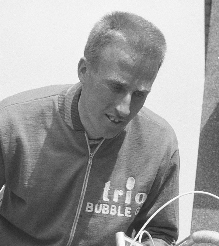 Olympiatoer van start, A. van Middelkoop (links) en E. Dolman helpen elkaar